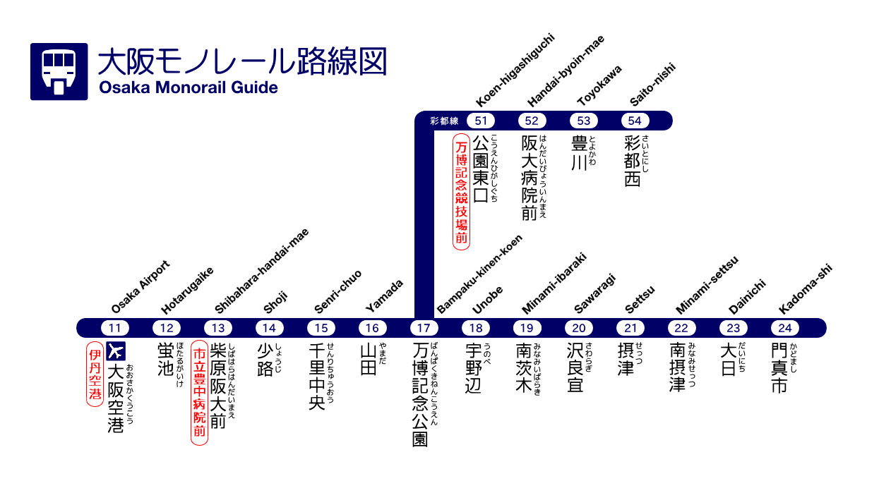 大阪高速鉄道路線図（2019年10月1日以降）